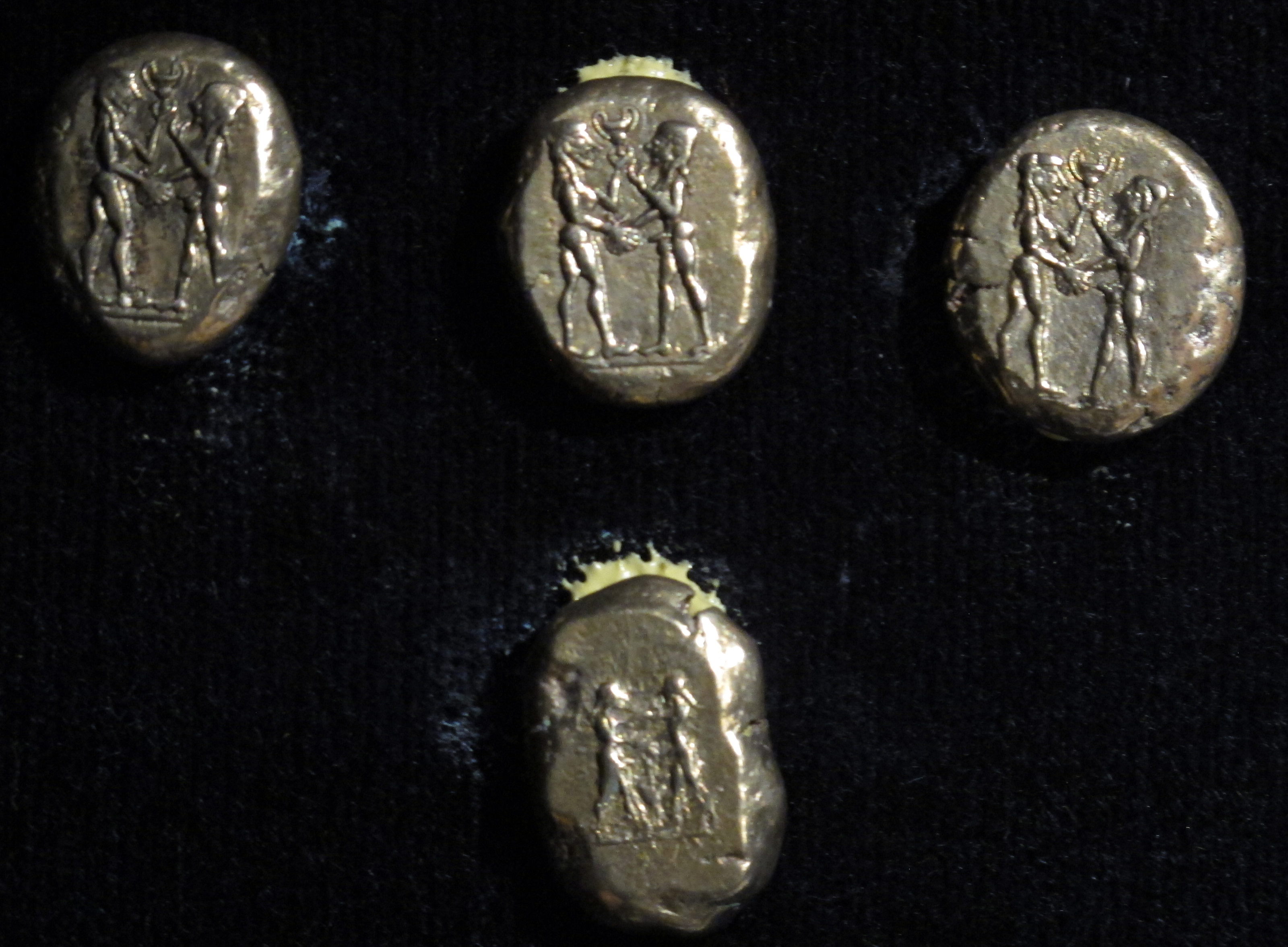 Tesoro di klazomenae, VI sec. ac.